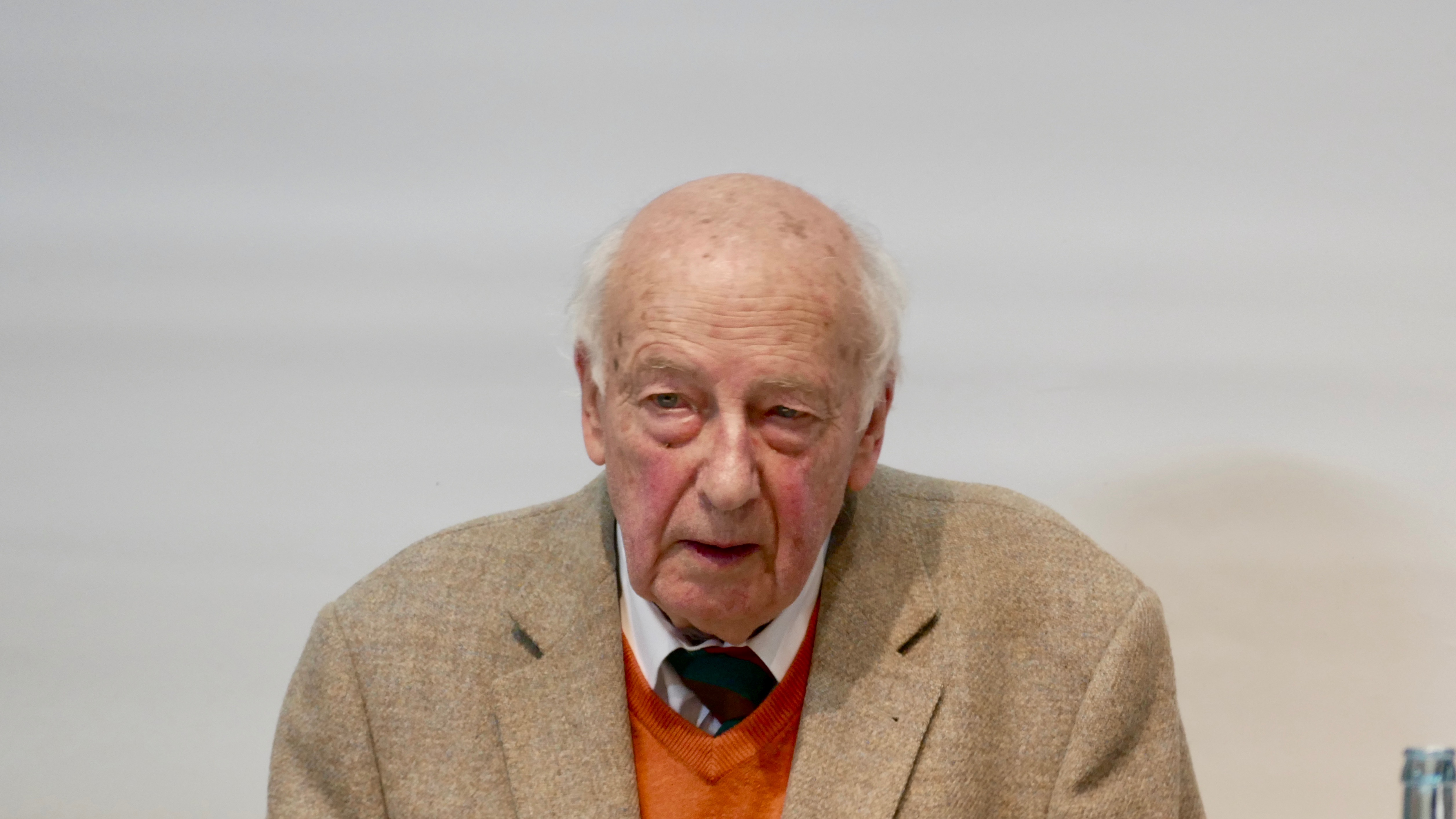 Andreas J.Meyer, Gründer des Merlin Verlages bei der Verleihung des Kurt Wolff-Preises für sein Lebenswerk